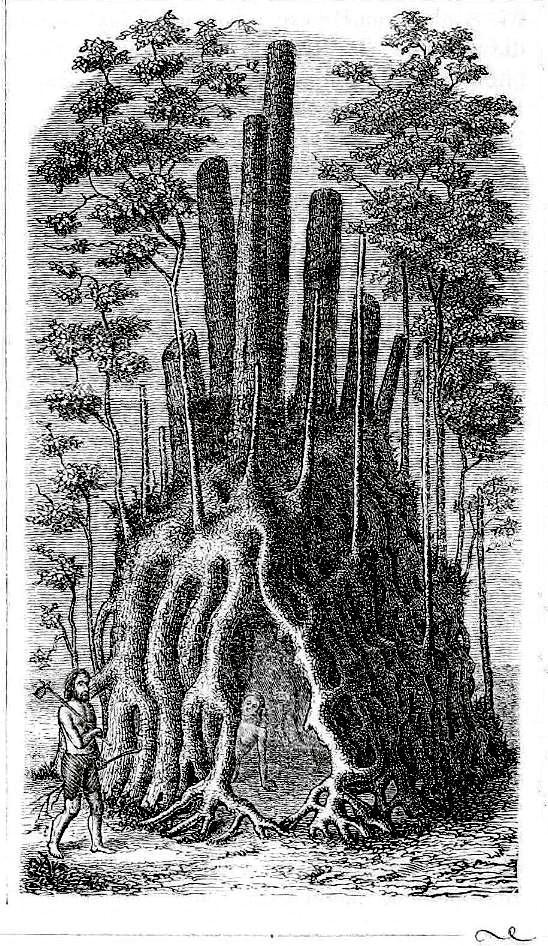 Bonplandia, VI. Jg. 1858, Abbildung auf Seite 82